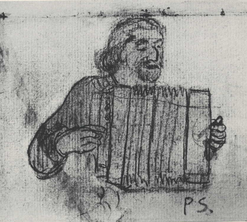 Bildnis Paul Gauguin (in der Bretagne). Zeichnung von P. Serusier.